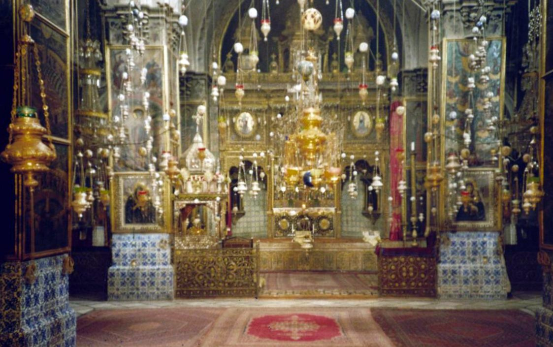 Интерьер армянского монастыря Сурб - Акоп в старом Иерусалиме (армянский квартал)